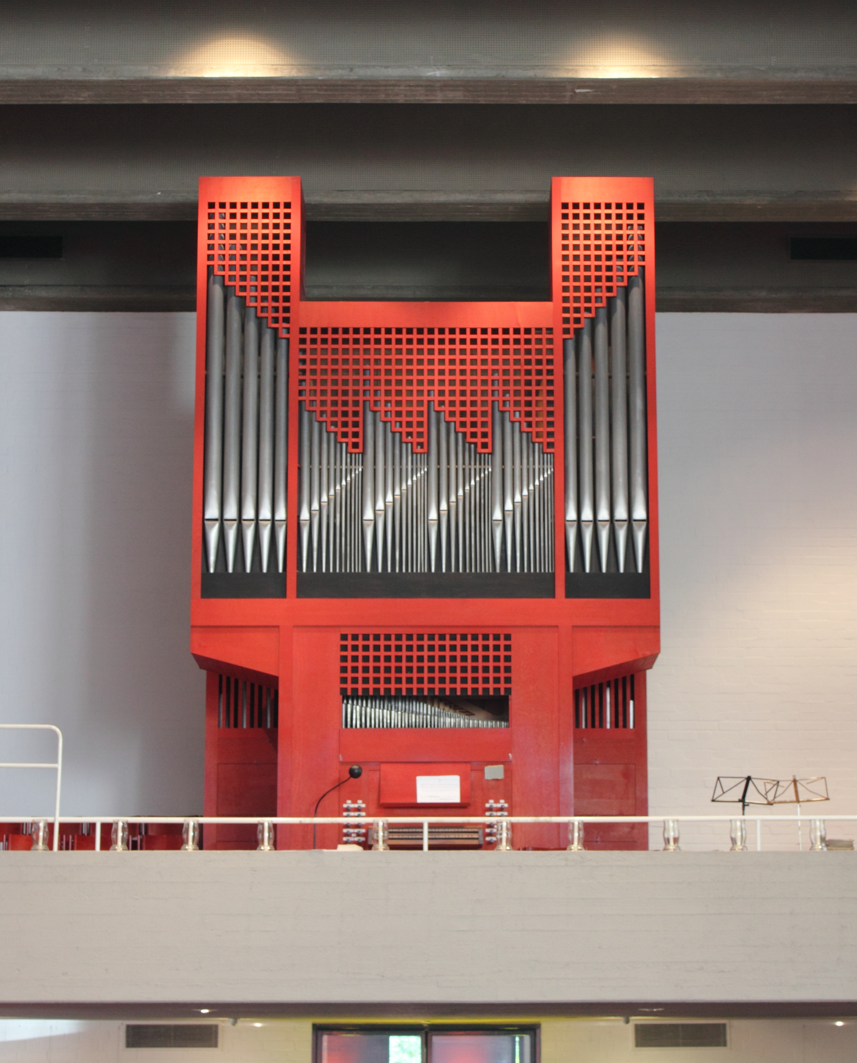 Orgel in Reinbek von Jürgen Ahrend 1972